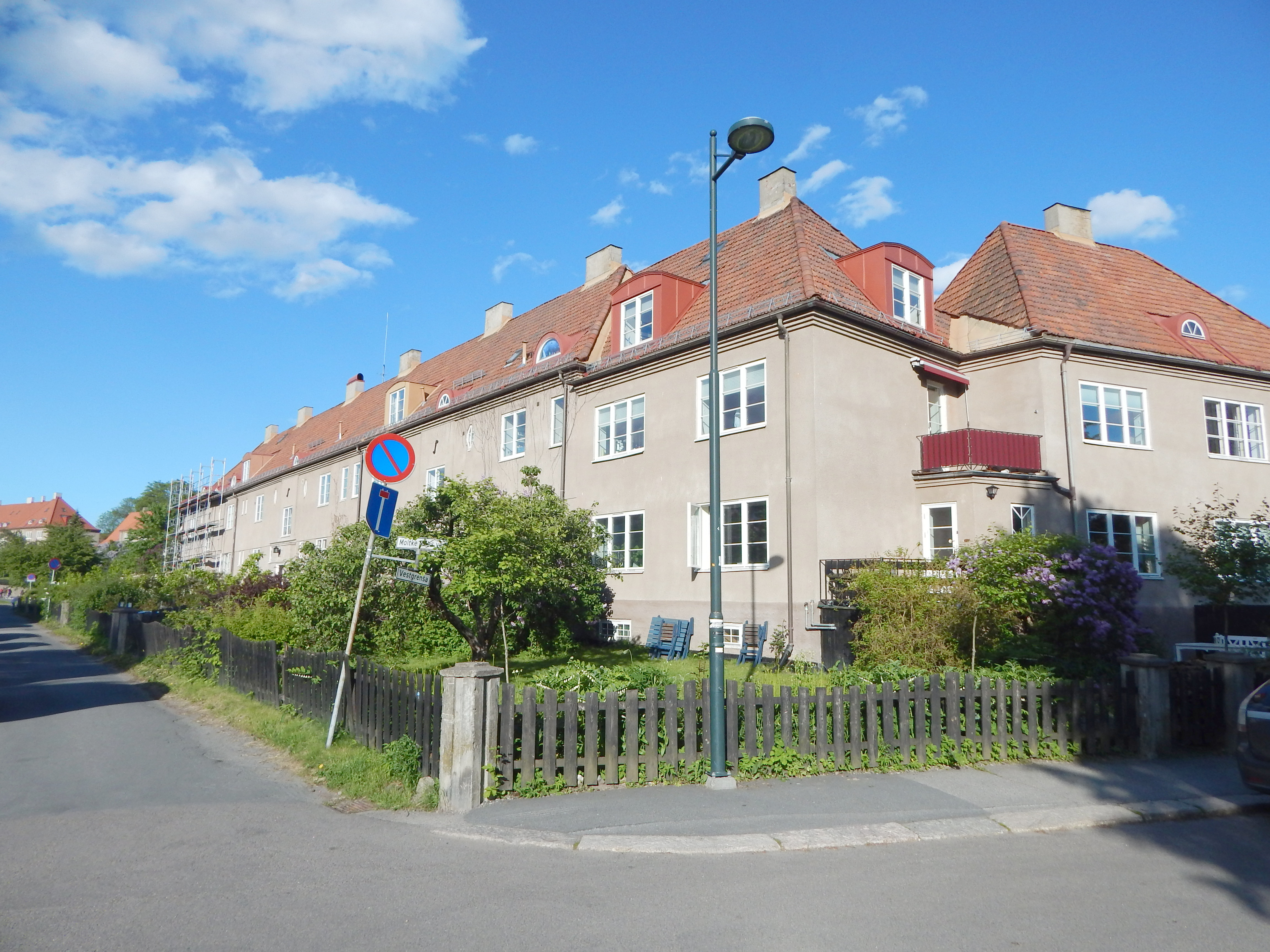 Krysset mellom Moltke Moes vei (t.h.) og Vestgrensa